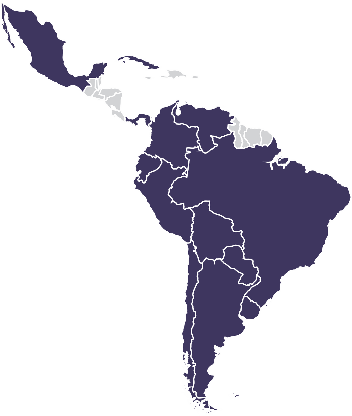 Mapa países miembros de ALADI